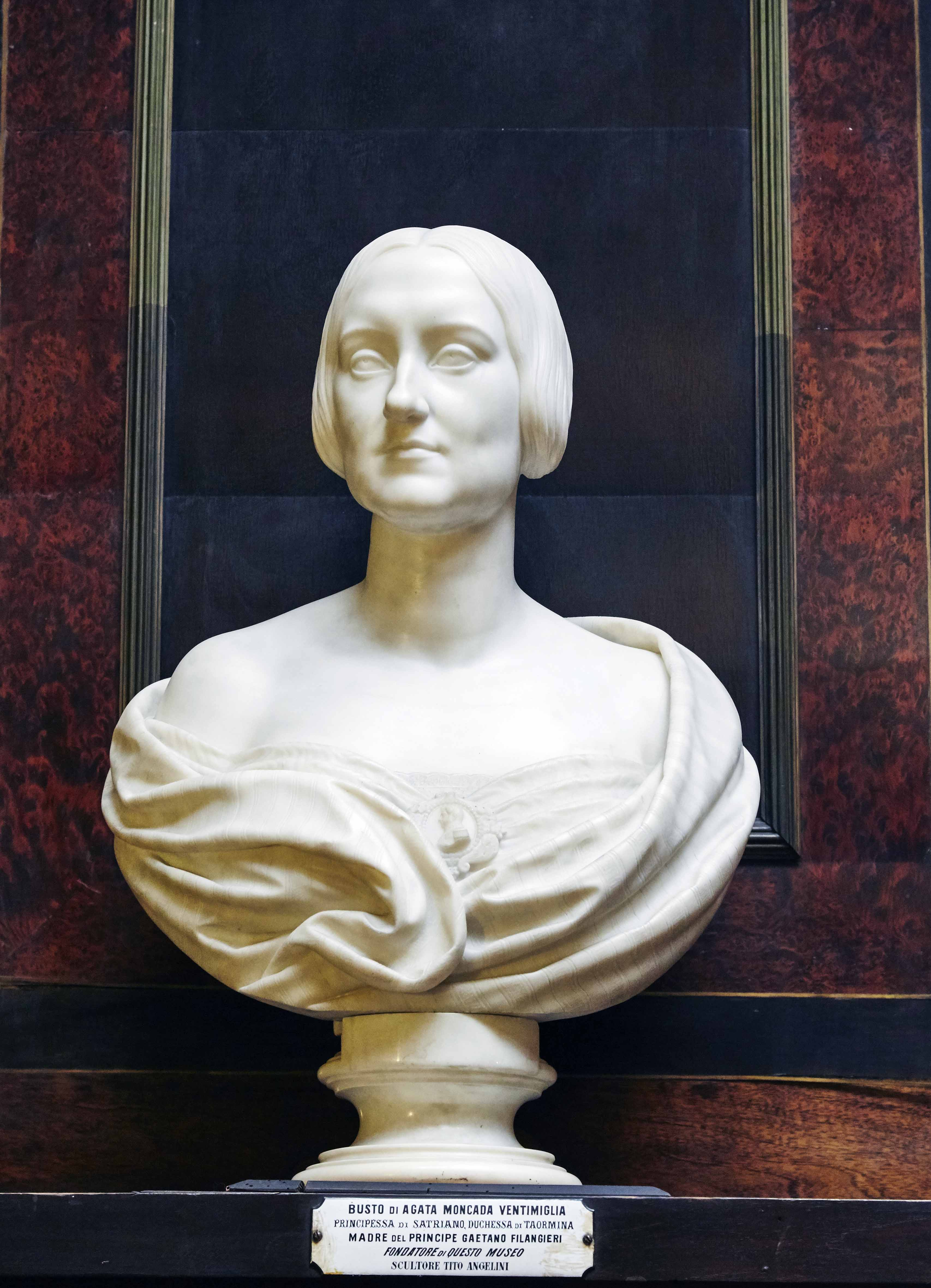 Agata Moncada di Paternò Principessa di Satriano Duchessa di Taomina Tito Angelini